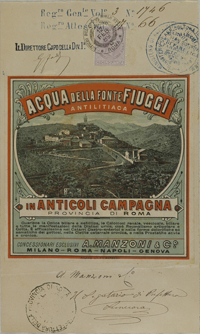 Registrazione dell'etichetta dell'acqua della fonte Fiuggi, 12 febbraio 1889 (ACS, Ministero dell'industria, del commercio e dell'artigianato, Fondo Ufficio italiano brevetti e marchi, Marchi, fasc. 17)